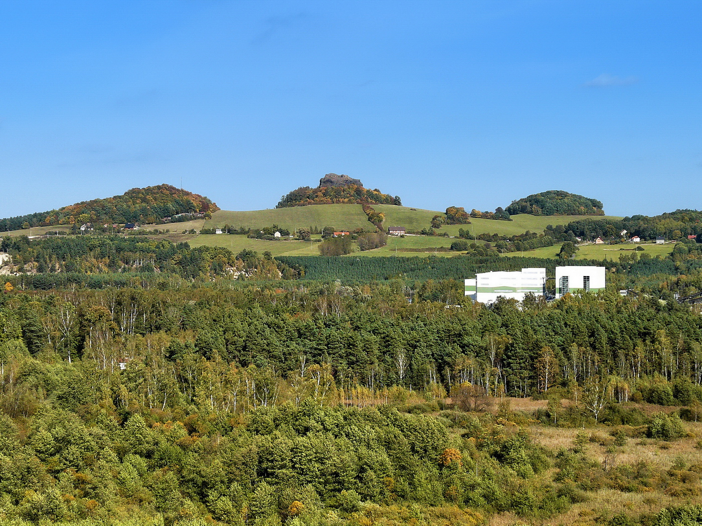 Provodínské kameny z hradu Jestřebí – zleva Michlův vrch, Lysá skála, Štrausův vrch.